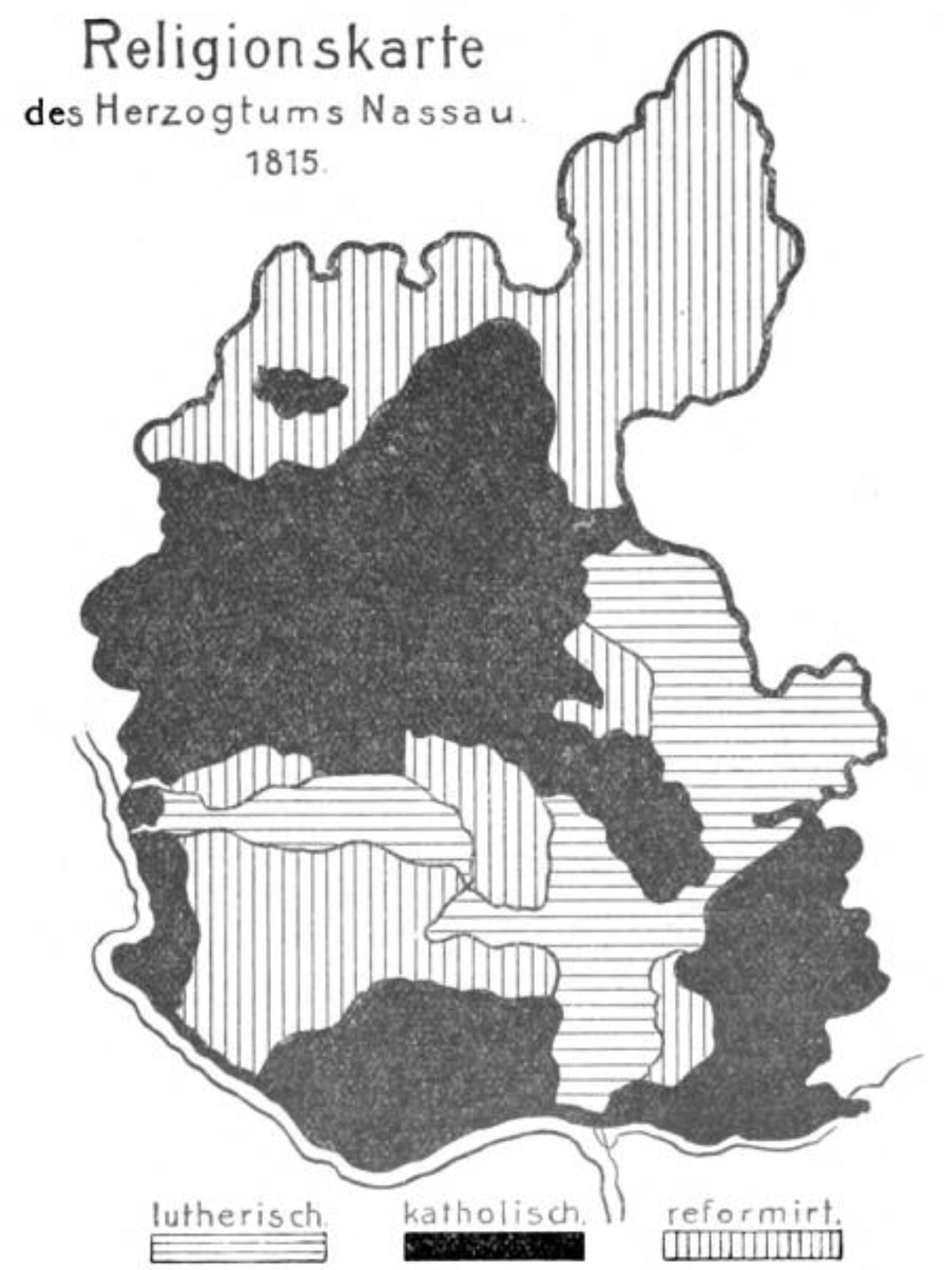 Religionskarte des Herzogtums Nassau mit dem Gebietsstand 1815